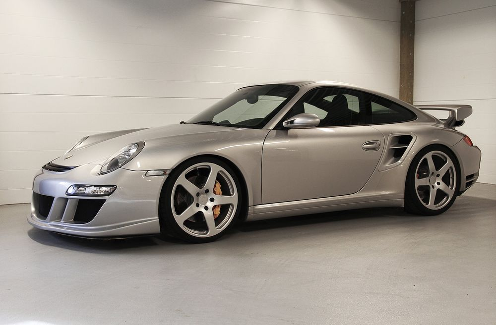 2008 Porsche 911 997 Turbo RUF RT 12